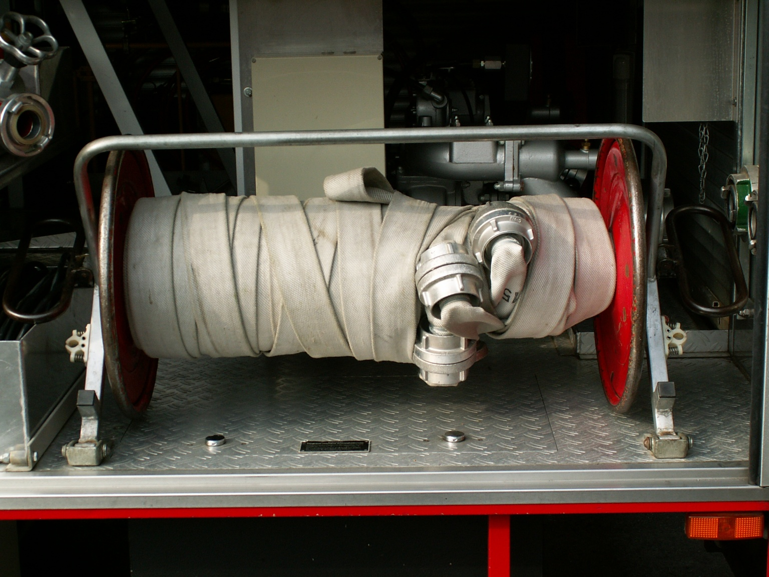 Schlauchhaspel mit C-Druckschläuchen im Geräteraum eines Löschgruppenfahrzeugs